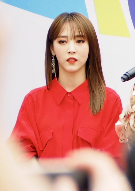 Moon Byul E in K-Food fair in 2018